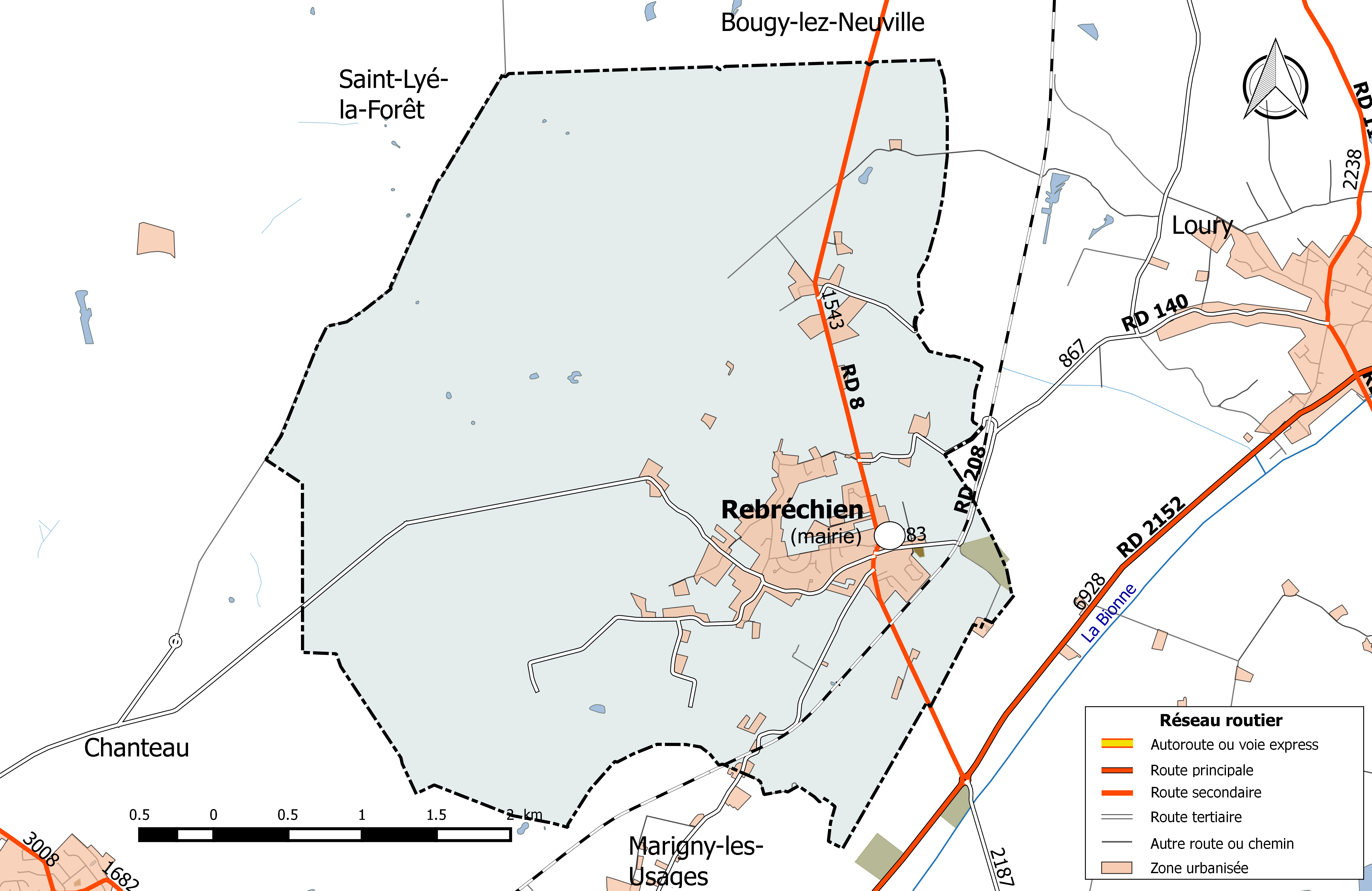 Carte du réseau routier de la commune de Rebréchien.